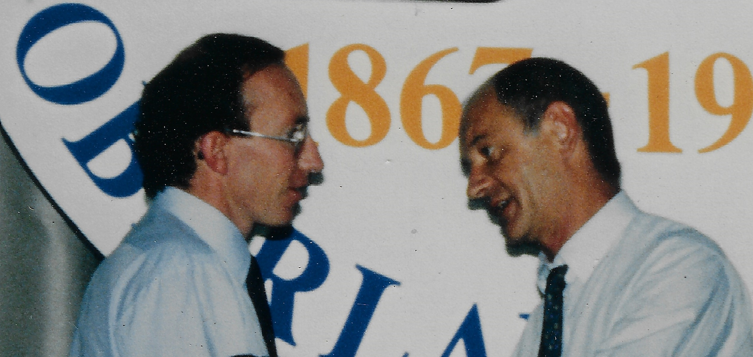 Horst Winterstein (rechts) mit Franz-Josef Sehr (links) beim KFV-Tag in Beselich-Obertiefenbach am 02. August 1986